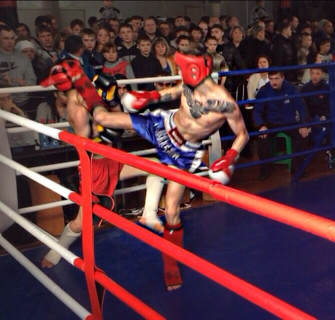 нокаут